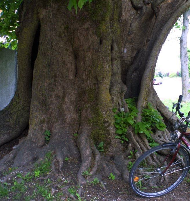 Dorfde:linden (Botanik) in Herzogenreuth auf Wikipediaformat gebracht --Immanuel Giel 13:50, 29. Mär 2005 (CEST) (für die GNU FDL)